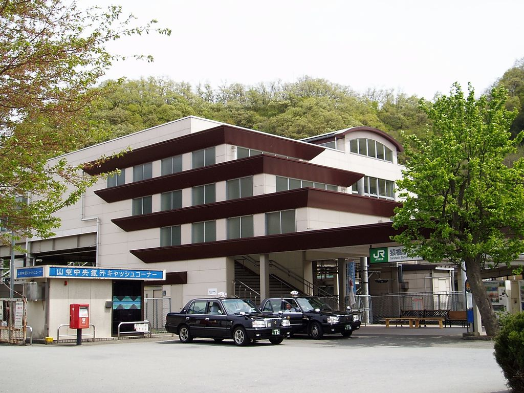 猿橋駅北口 2007.04.22 投稿者が撮影